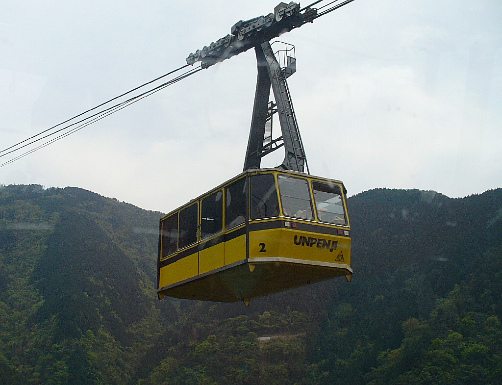 雲辺寺ロープウェイ